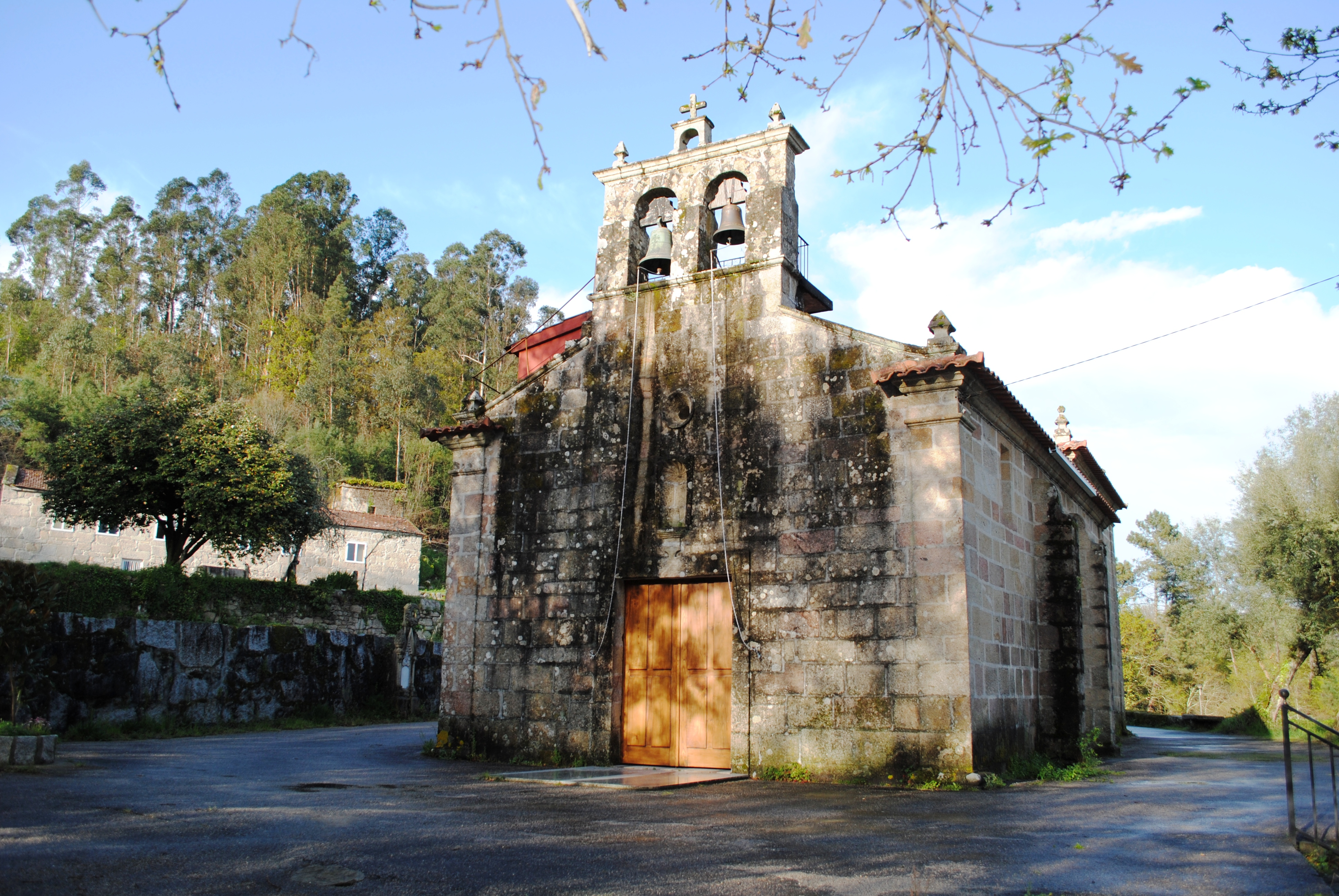 Iglesia parroquial de San Breixo de Arcos, Ponteareas.